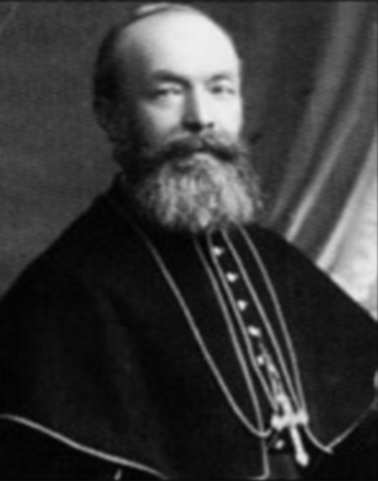 Ep. Dominic Jaquet (1843-1931) Bishop of Bistum Iași 1895-1903